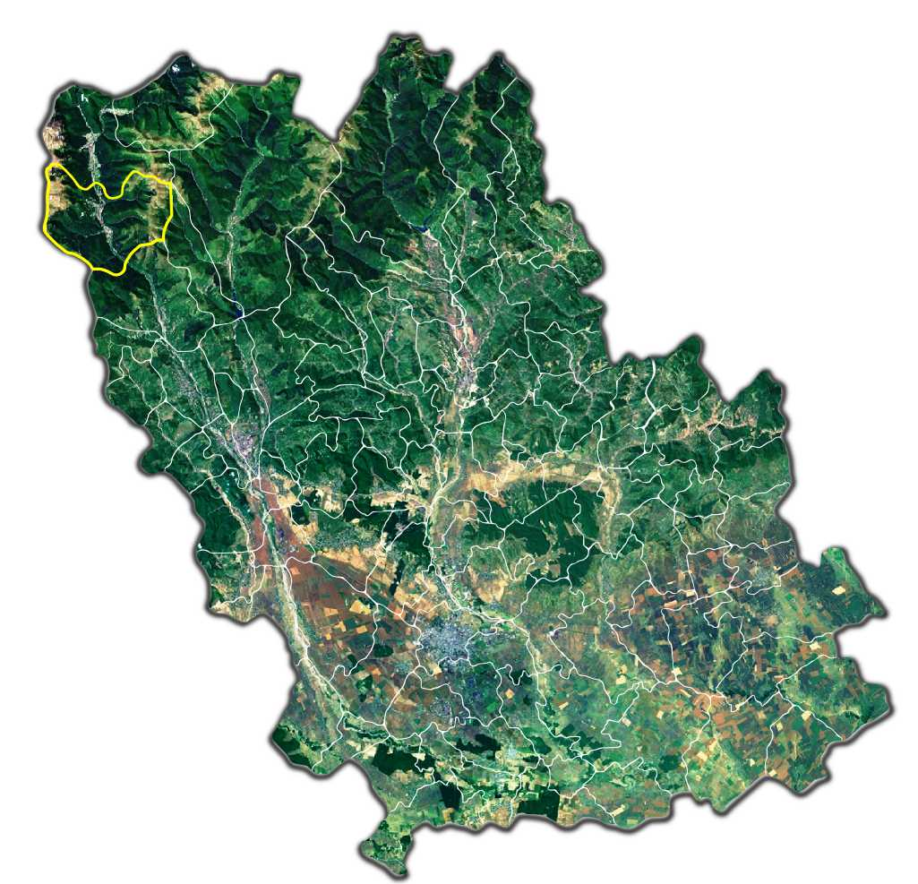 Sinaia jud Prahova.